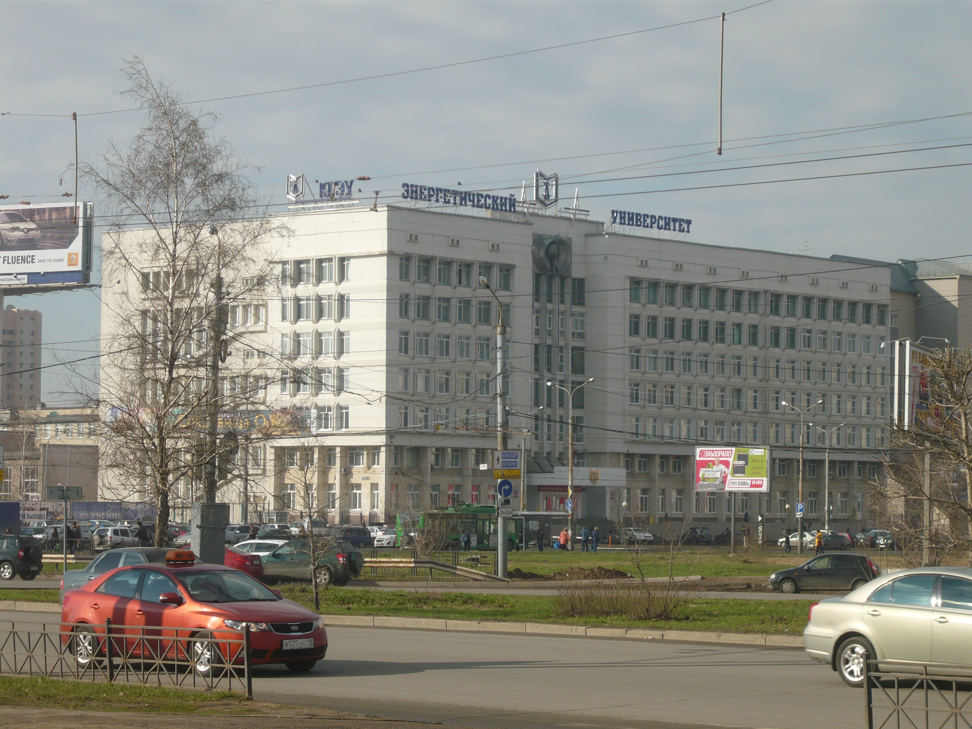 Казанский государственный энергетический университет